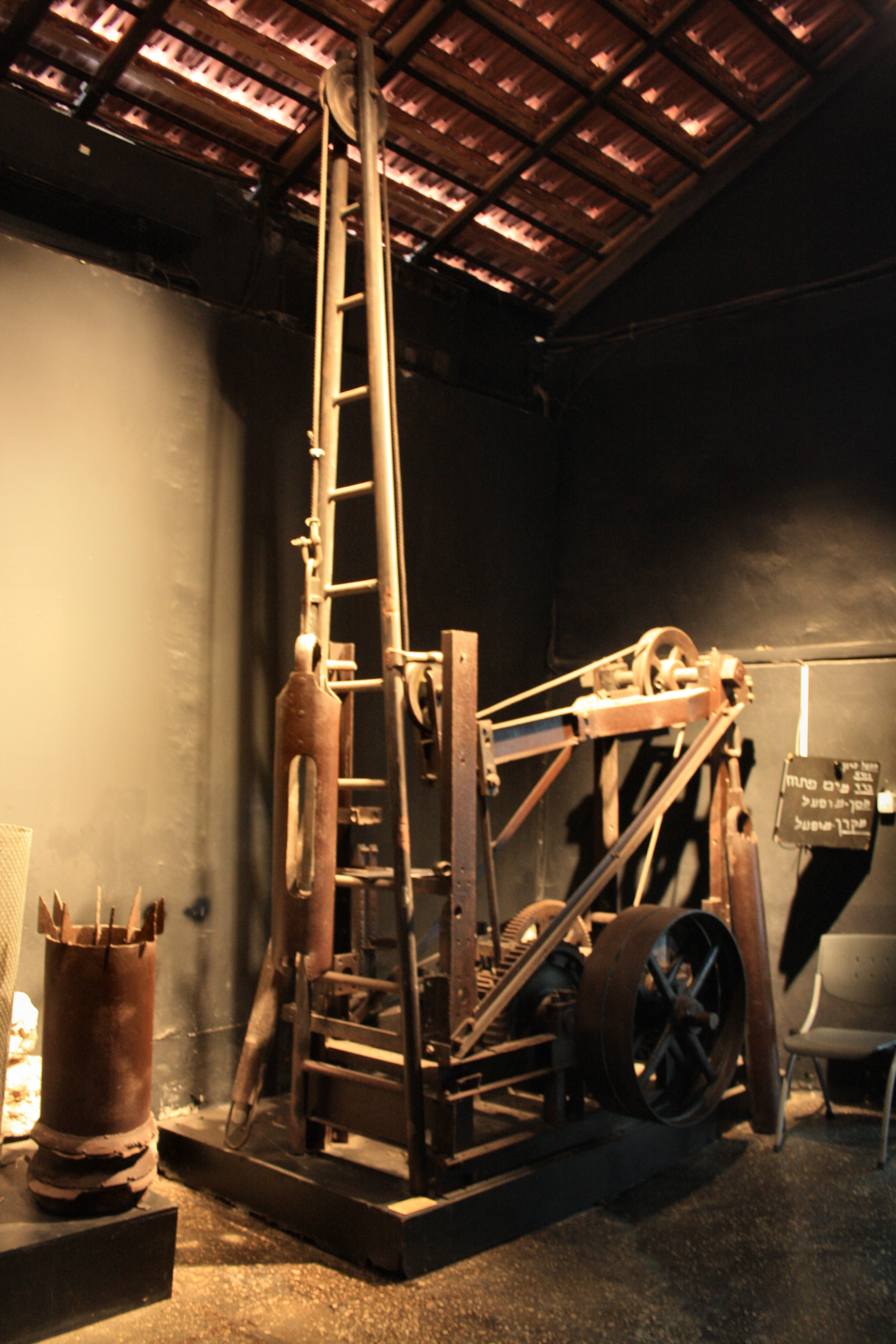 רחוב רוטשילד 19, ראשון לציון. באר "מצאנו מים"', הבאר הראשונה שנחפרה בראשון ובה נמצאו מים שאפשרו את קיום המושבה.